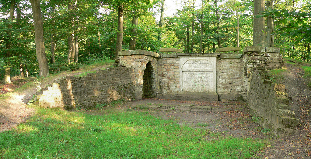 Luccaburg